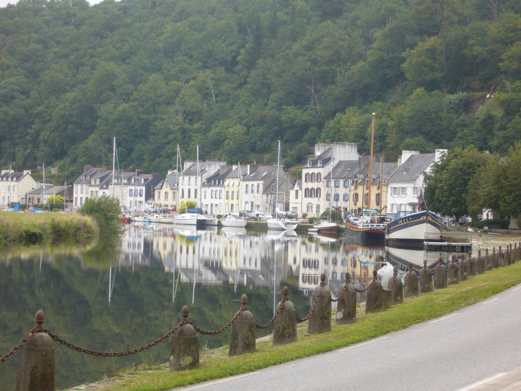 Auteur: Utilisateur:Suaudeau